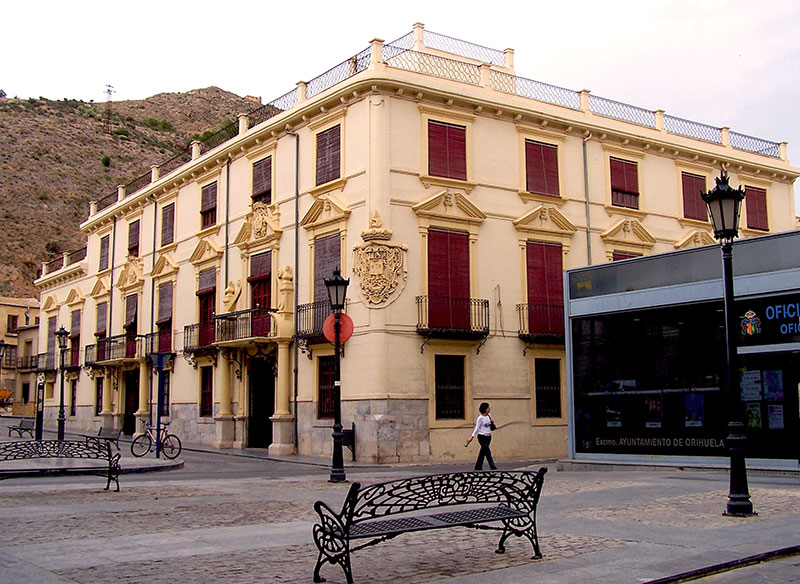 Palacio del Marqués de Rafal